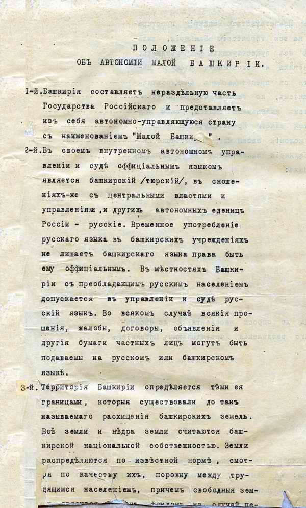 Первые три пункта Положения об автономии Малой Башкирии